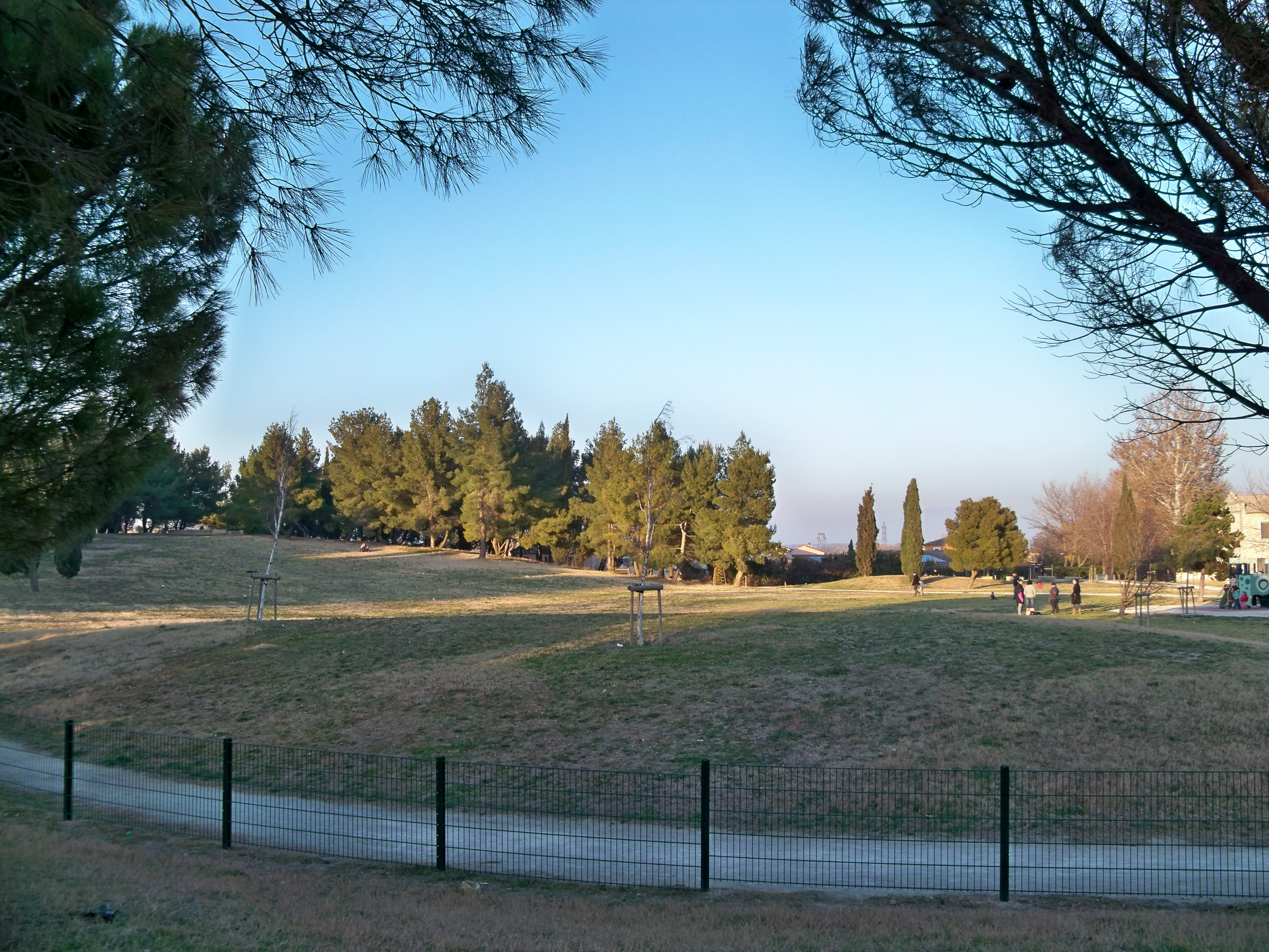 Parc Chico Mendes, quartier du Pont des 2 Eaux à Avignon (84)